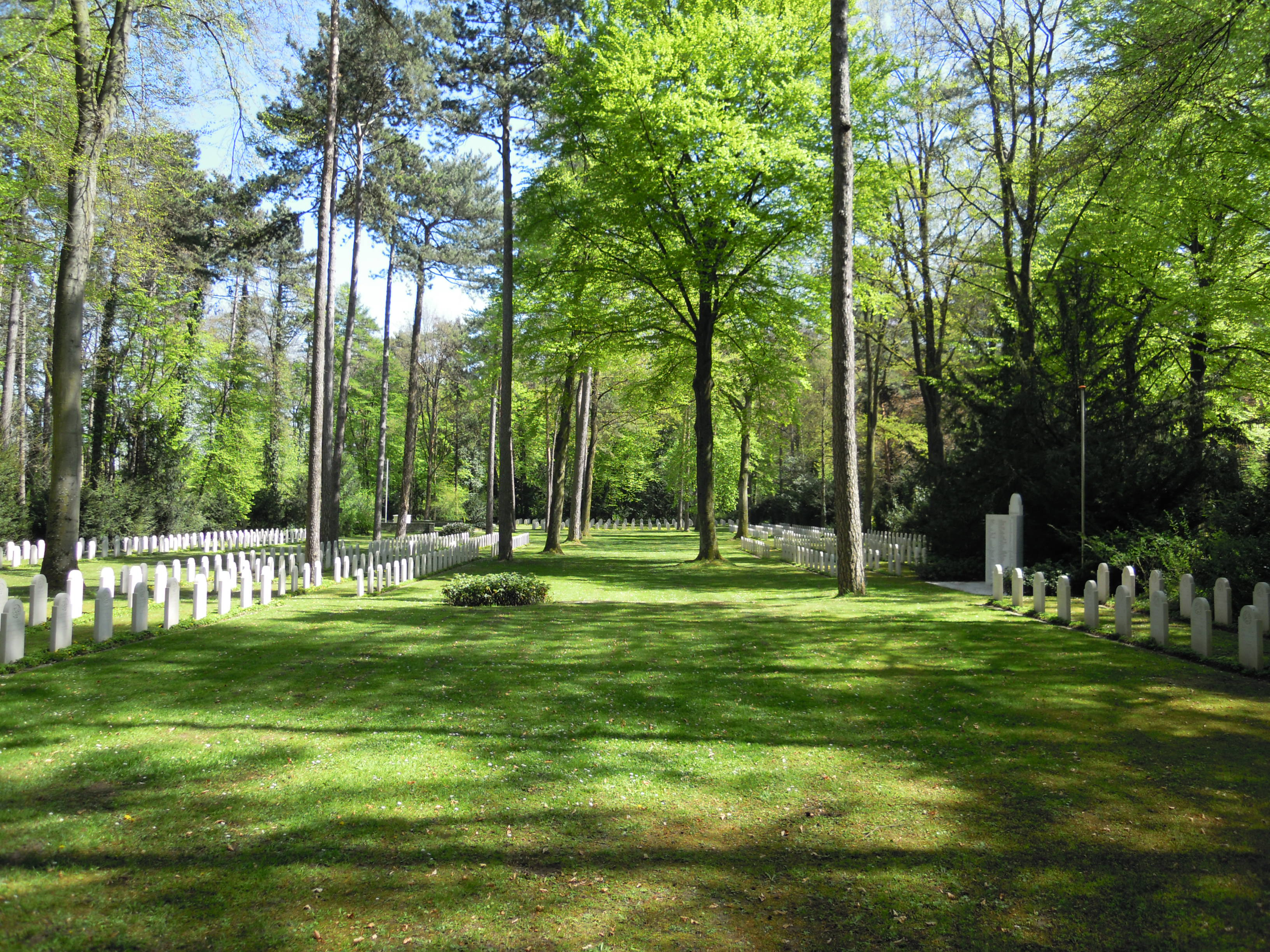 Waldfriedhof in Frankfurt-Oberrad, Burgenlandweg, Niederländisches Ehrenfeld